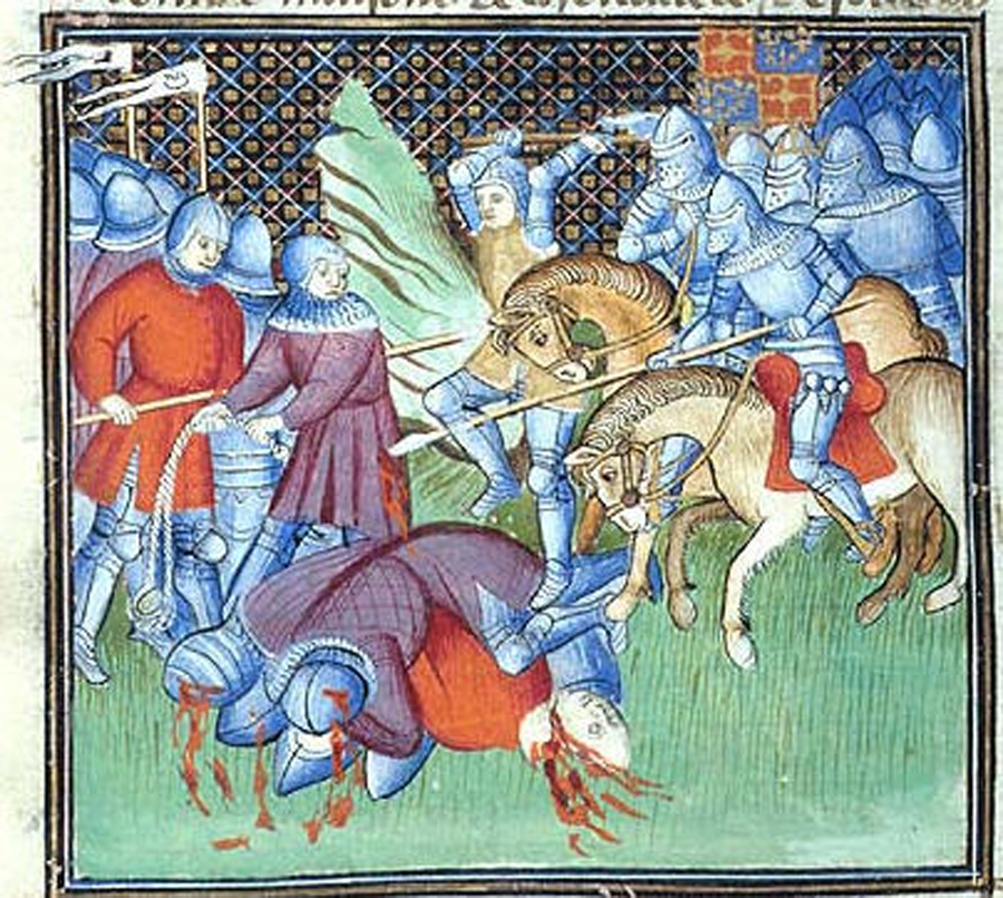 jacquerie a Karel II. Navarrský